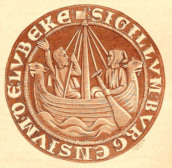 Lübecker Stadsigel.